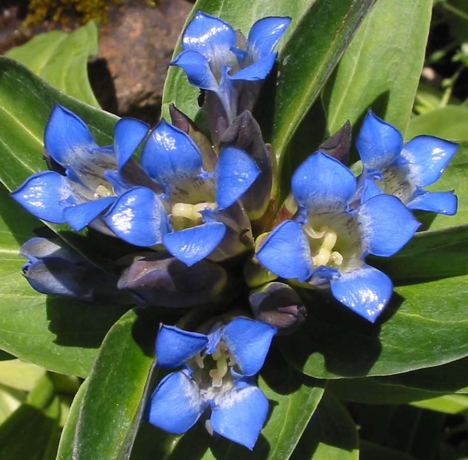 Gentiana cruciata, Jardin alpin, Jardin des Plantes de Paris